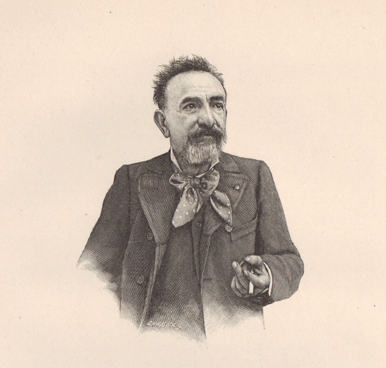 French engraver and stamp designer Louis-Eugène Mouchon (1843-1914)